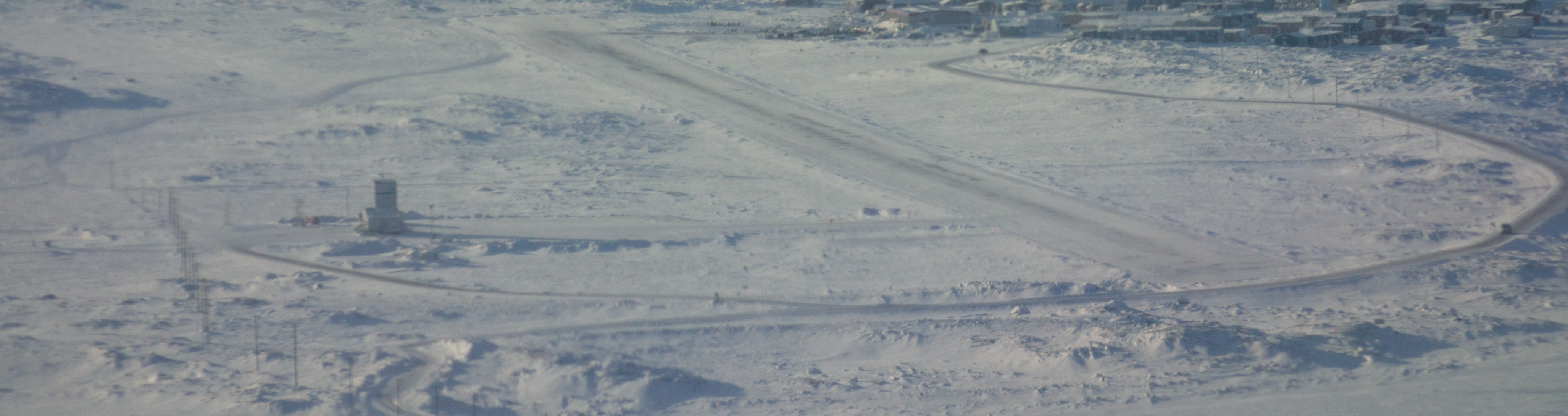 Aerial view of Kugaaruk airport in Nunavut